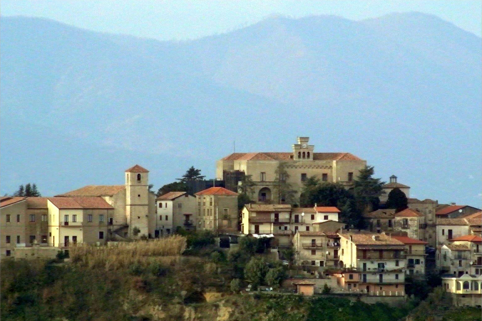 Foto di Luigino Capizzano